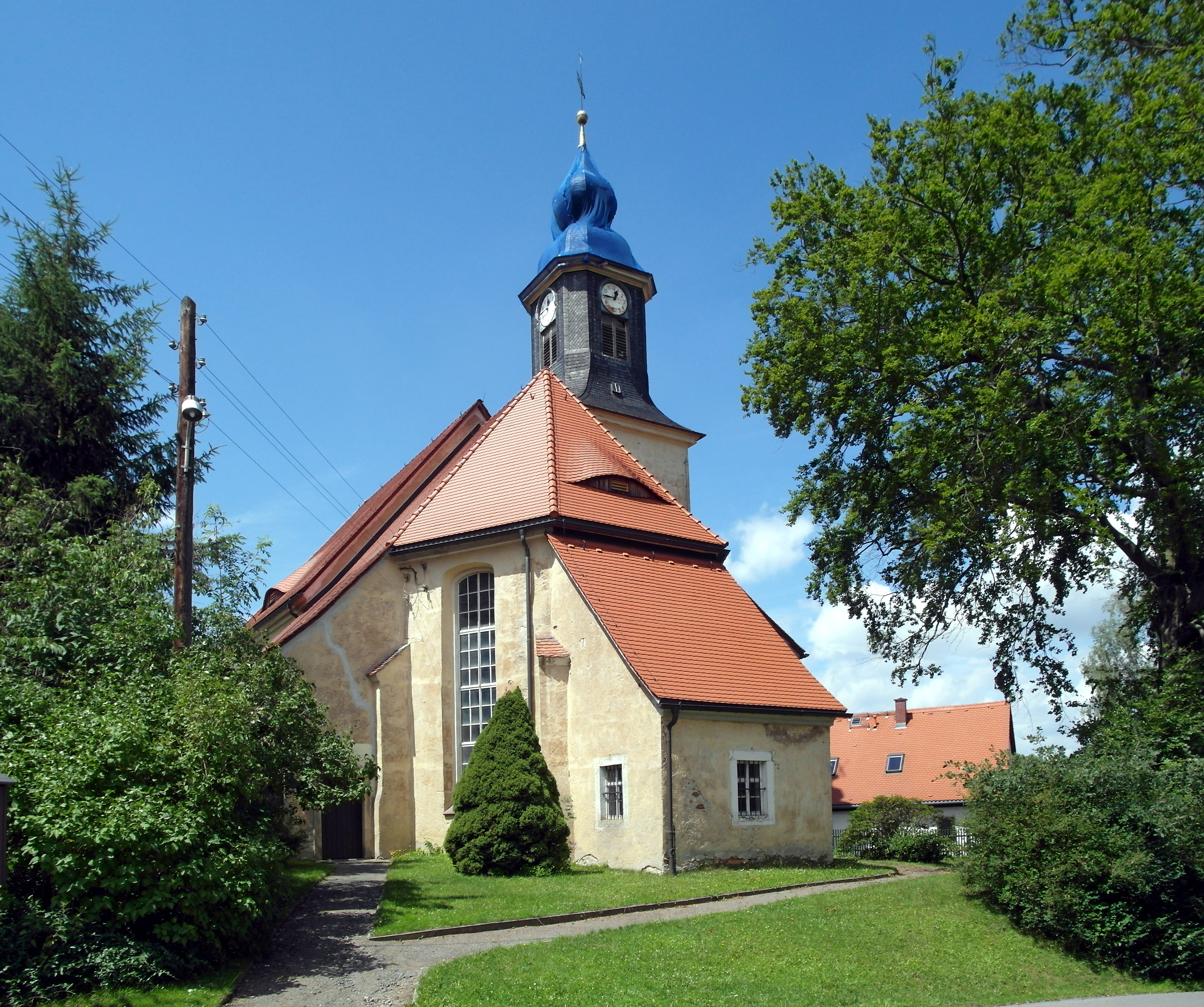 03.07.2017 09600 Oberschöna: Kirche Oberschöna, Am Geyersberg 23 (GMP: 50.895727,13.253773). Neubau nach Brand vom November 1761. Sicht von Südosten. [SAM0808.JPG]20170703260DR.JPG(c)Blobelt